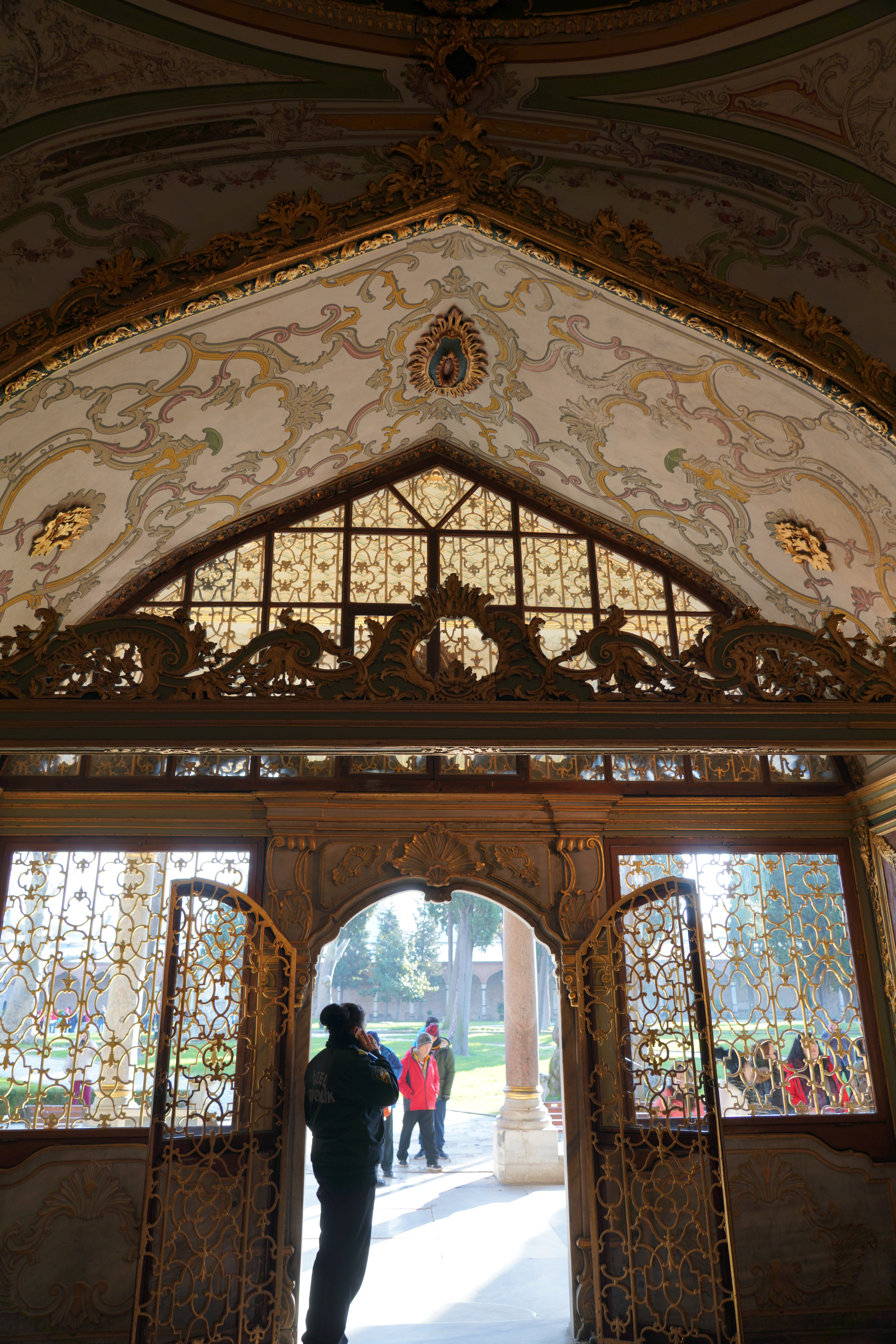 20180115_Topkapi_8046